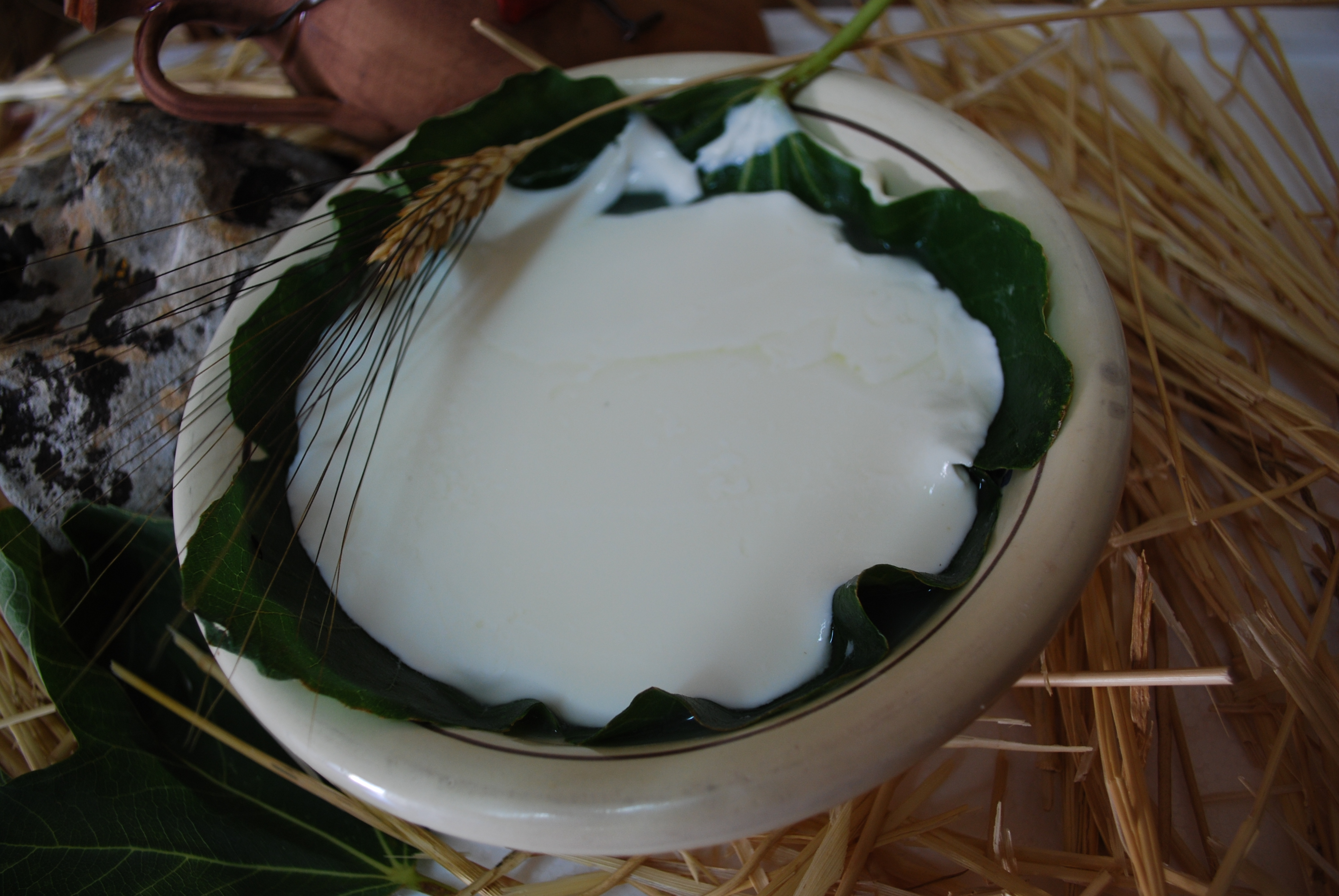 Formaggio tradizionale della provincia di Taranto